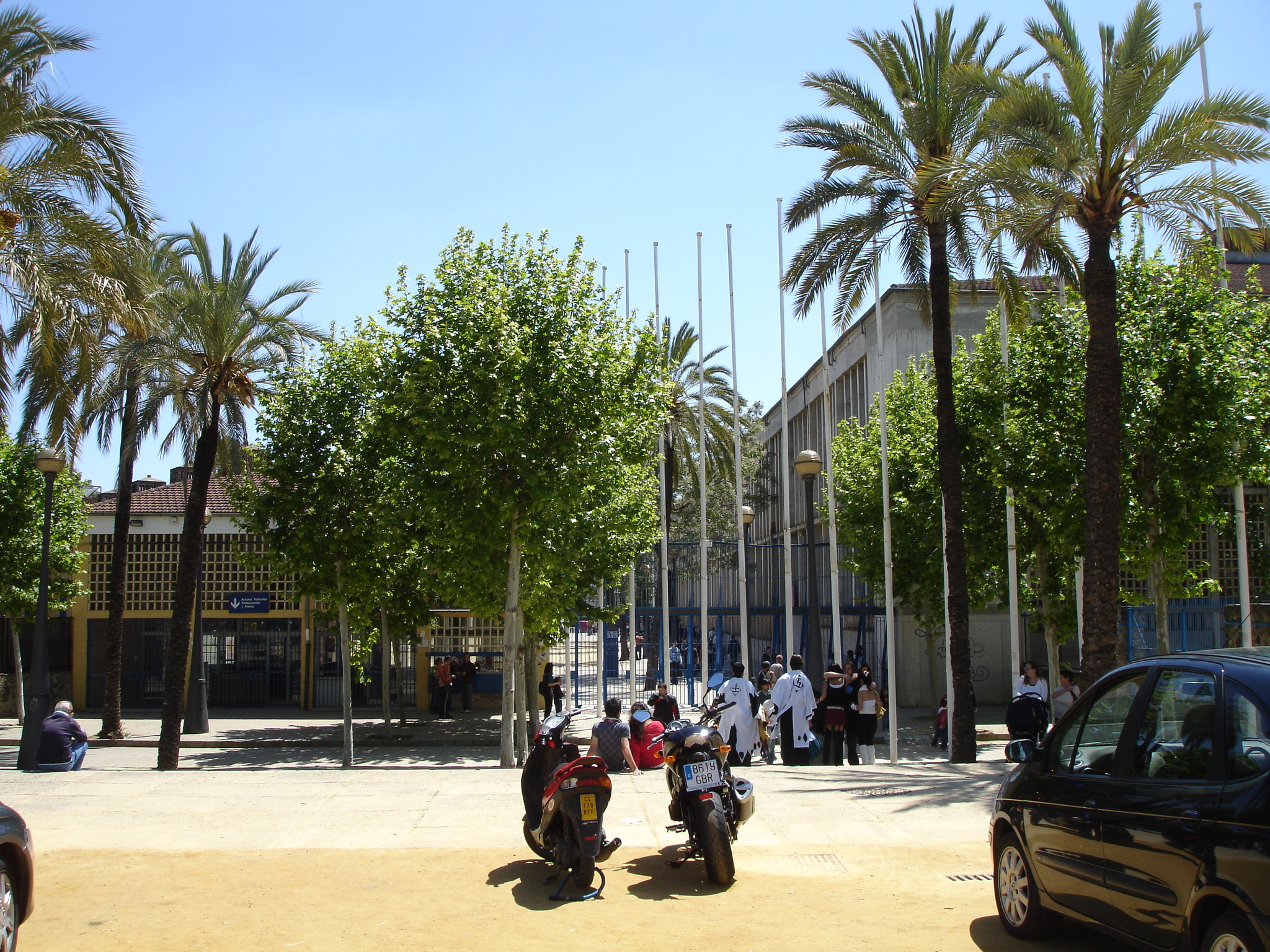 IFECA en la celebración del Salón Manga, Jerez (Spain)